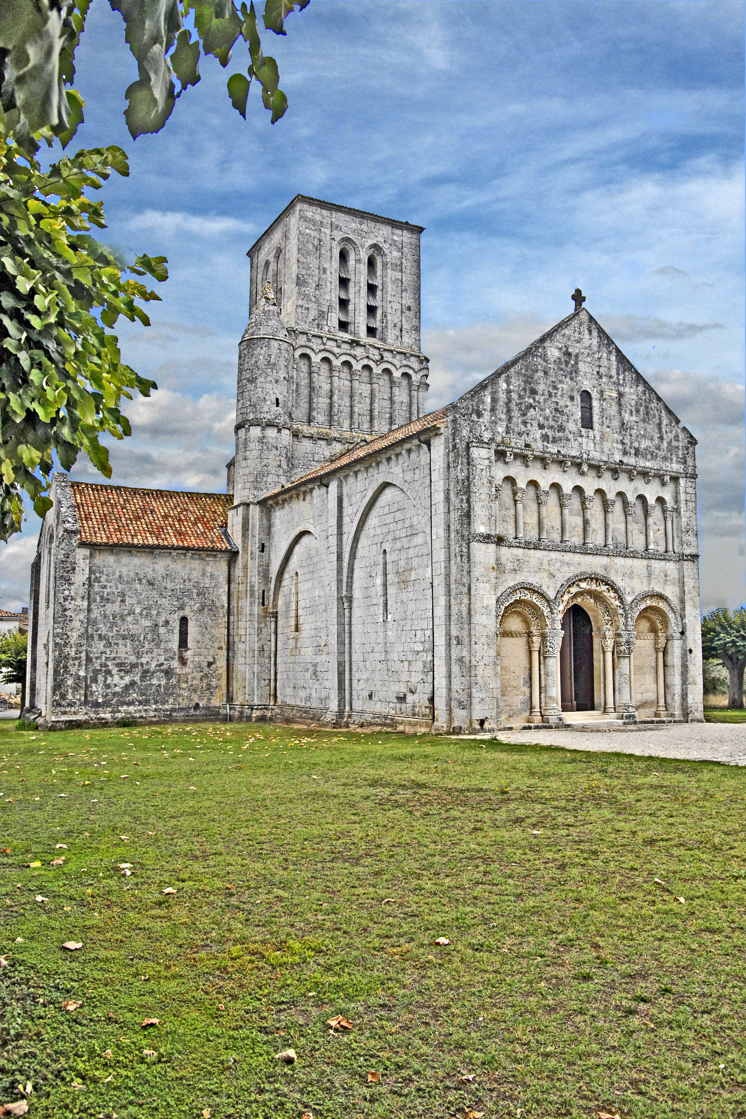 Noter-Dame Corme-Écluse, von NW